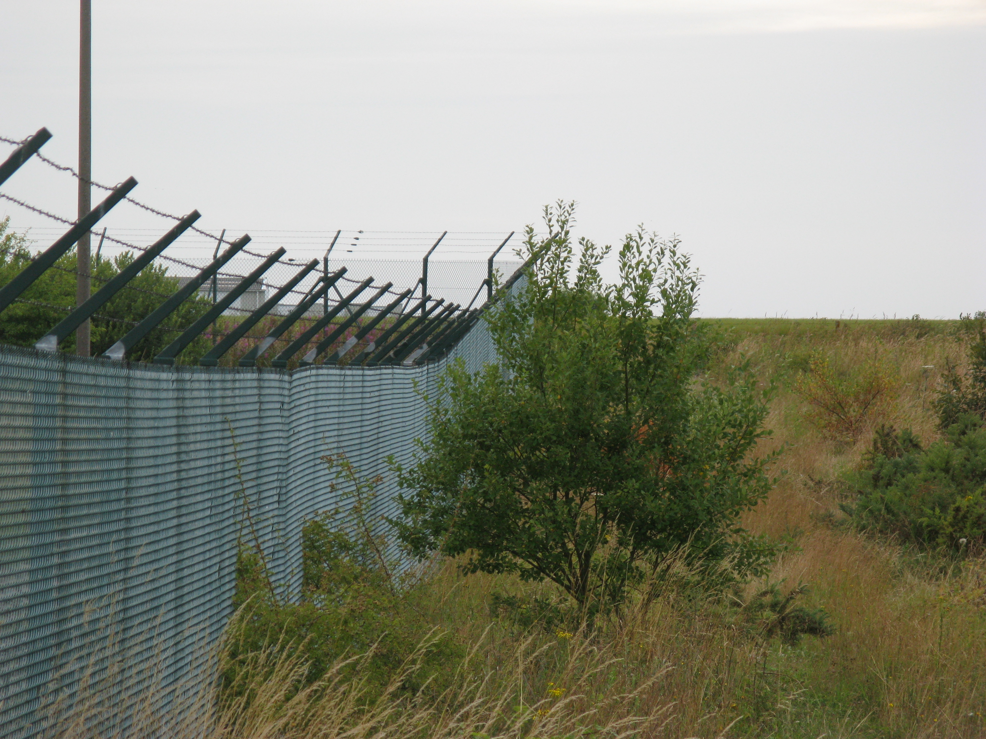 Kernkraftwerk Penly